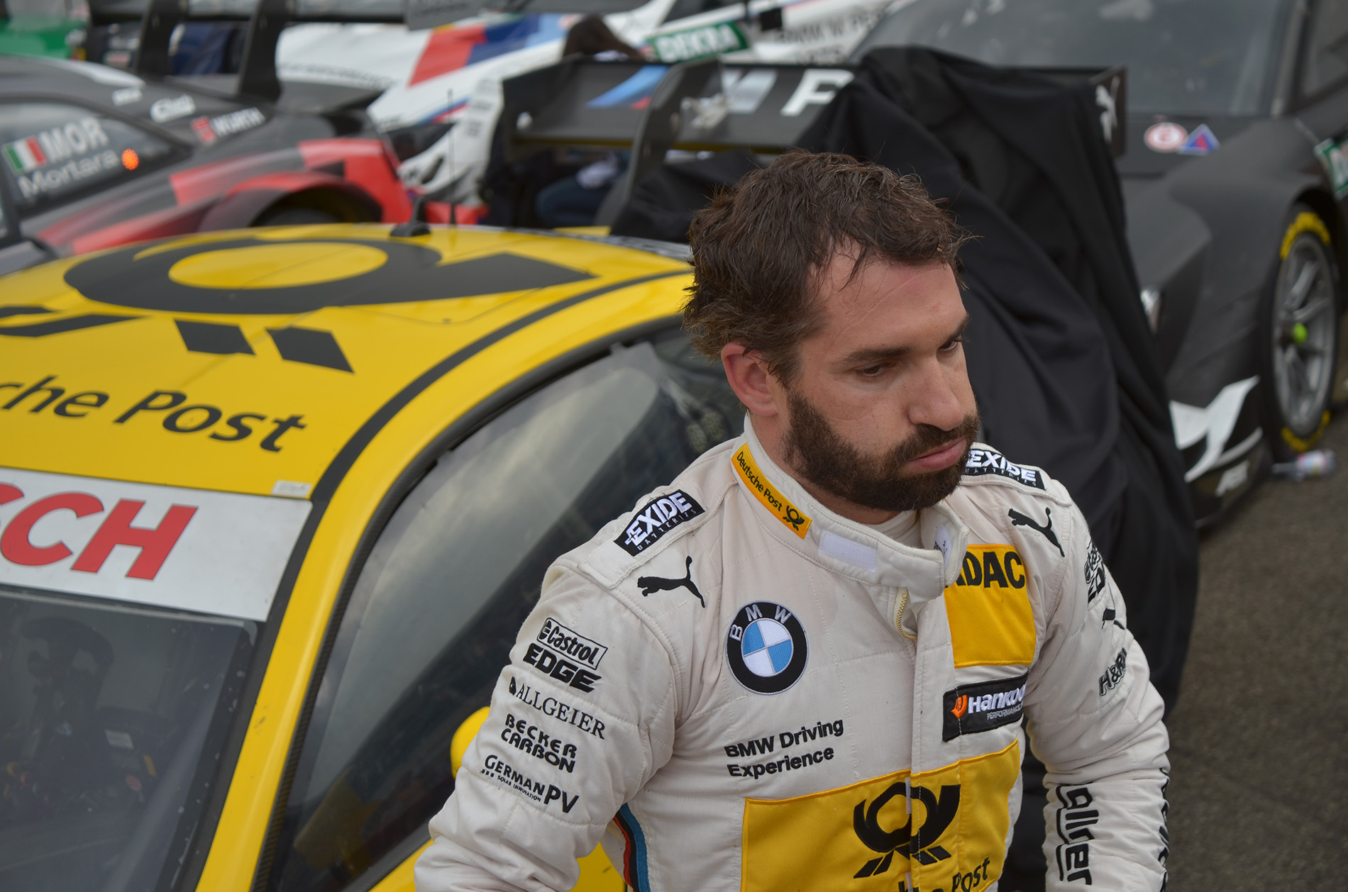 Timo Glock a DTM 2014-es magyar futama után.